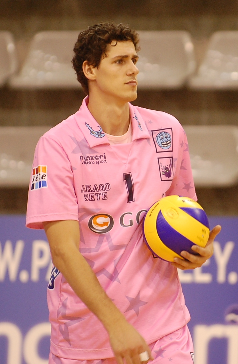 Jakub Veselý, joueur de volley-ball professionnel qui évolue au poste de central.